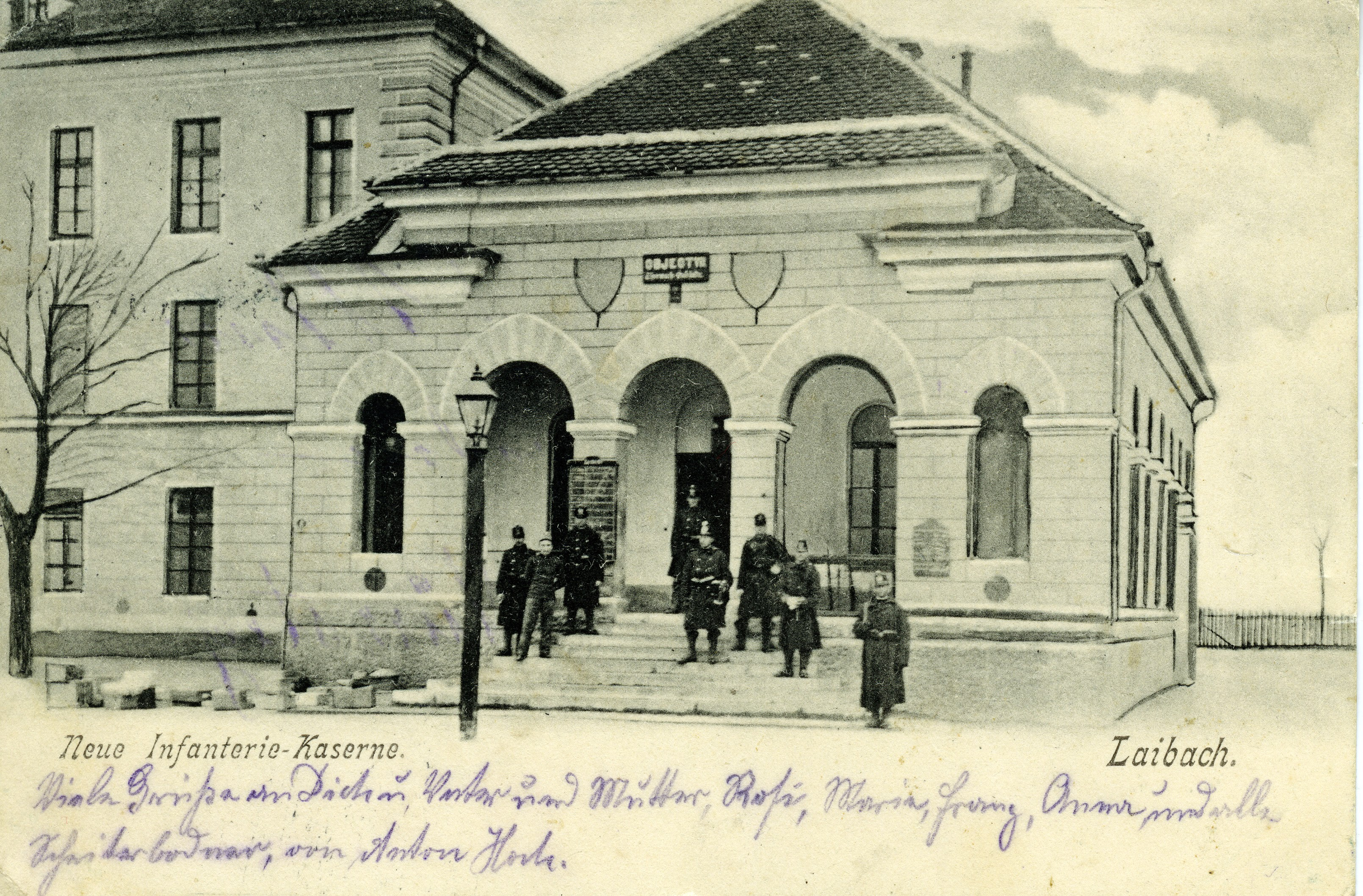 Mestna pehotna vojašnica v Ljubljani.